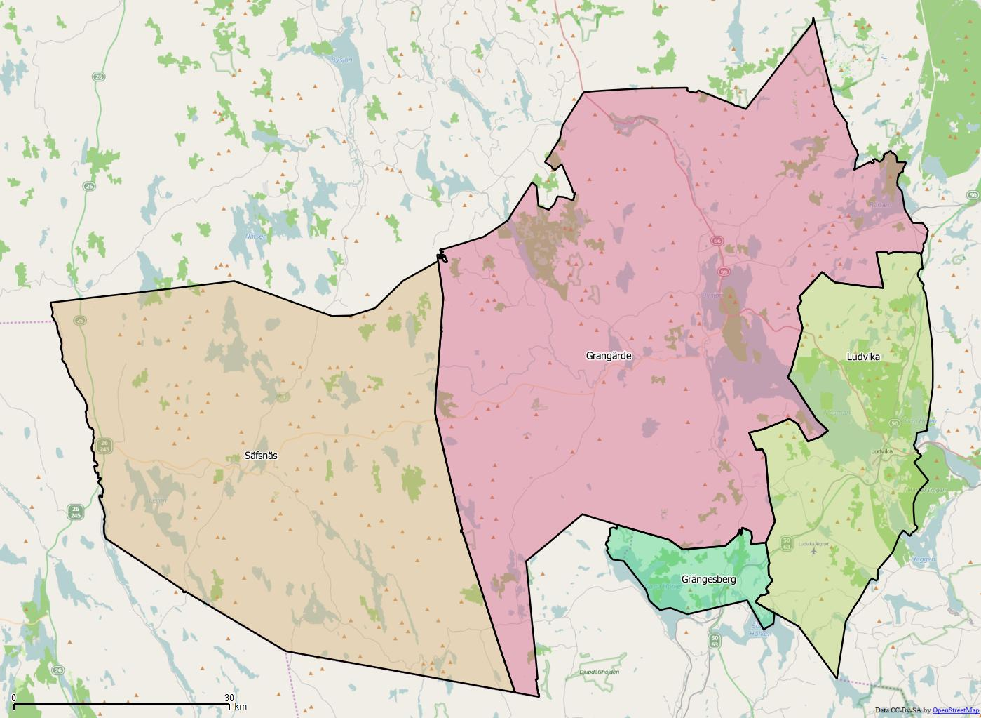 Distriktsindelningen i Ludvika kommun World file: 97.48819487406085216 0 0 -97.48819487406085216 1567460.20551542611792684 8495858.13335716165602207